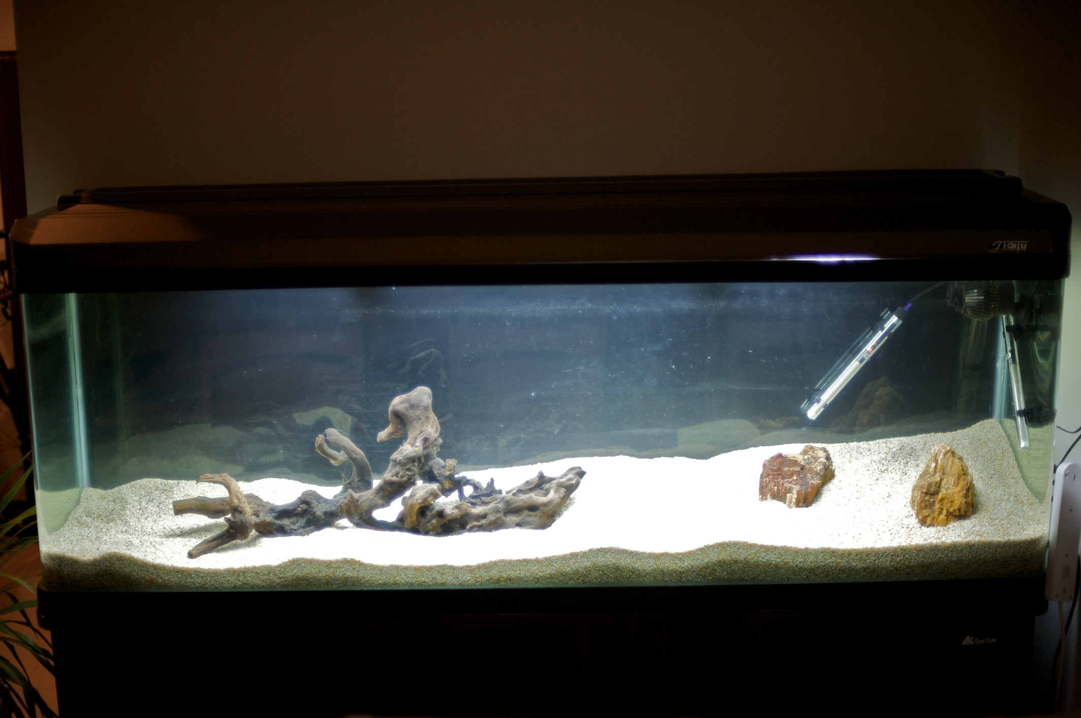 An aquarium